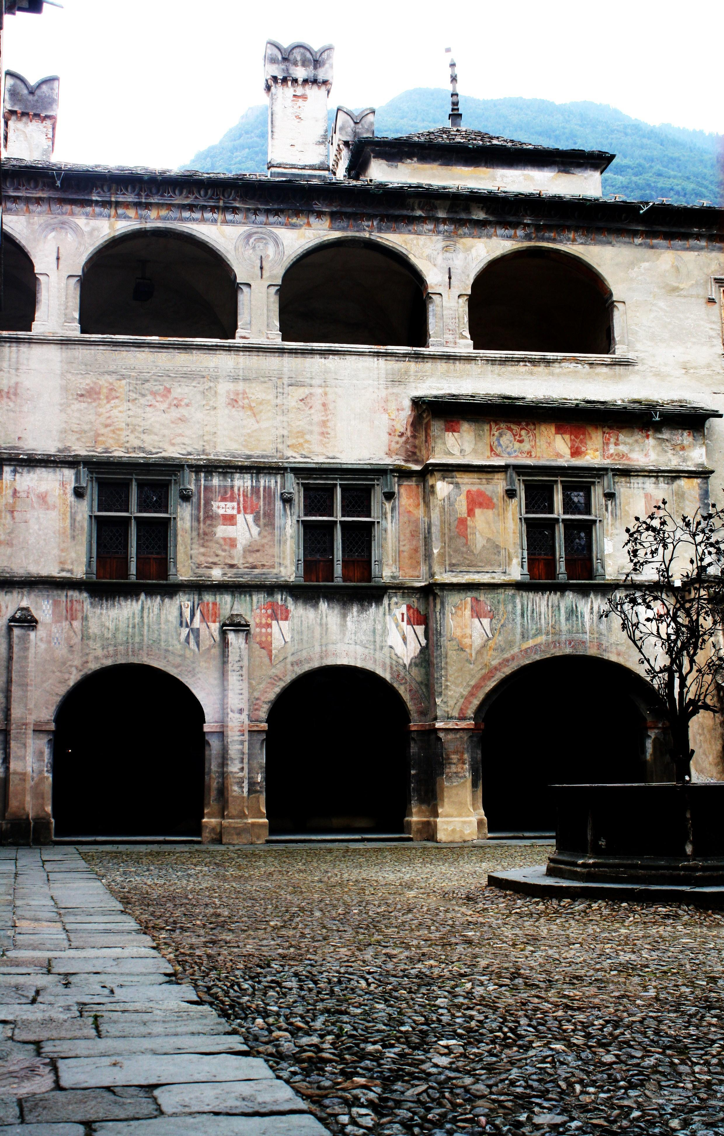 Cortile interno e porticato del castello d'Issogne con la fontana del melograno. This is a photo of a monument which is part of cultural heritage of Italy.